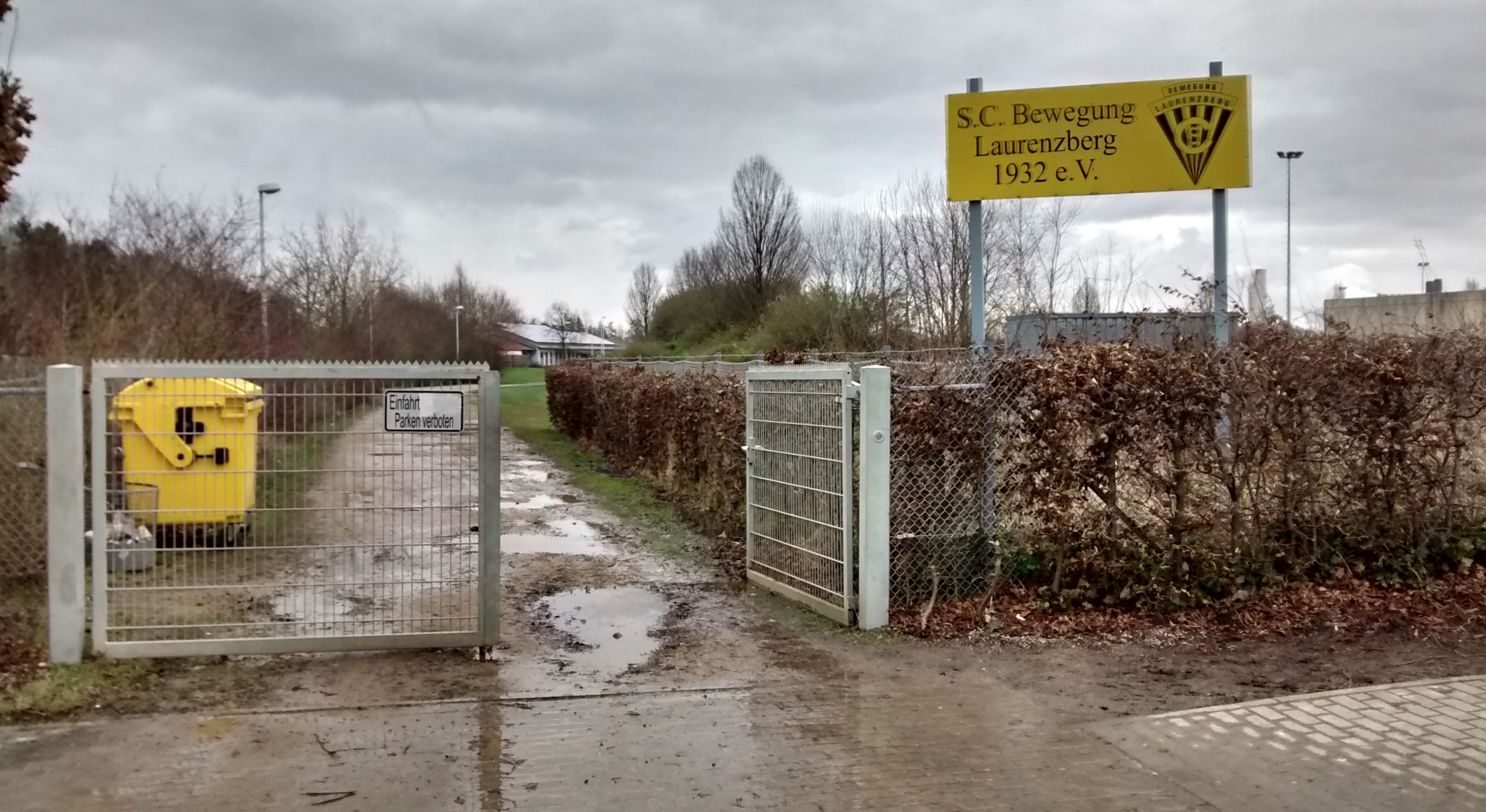 Impressionen aus der südöstlichen Umgebung des Blausteinsees und des Naherholungsgebiets Dürwiß vom Dezember 2014.